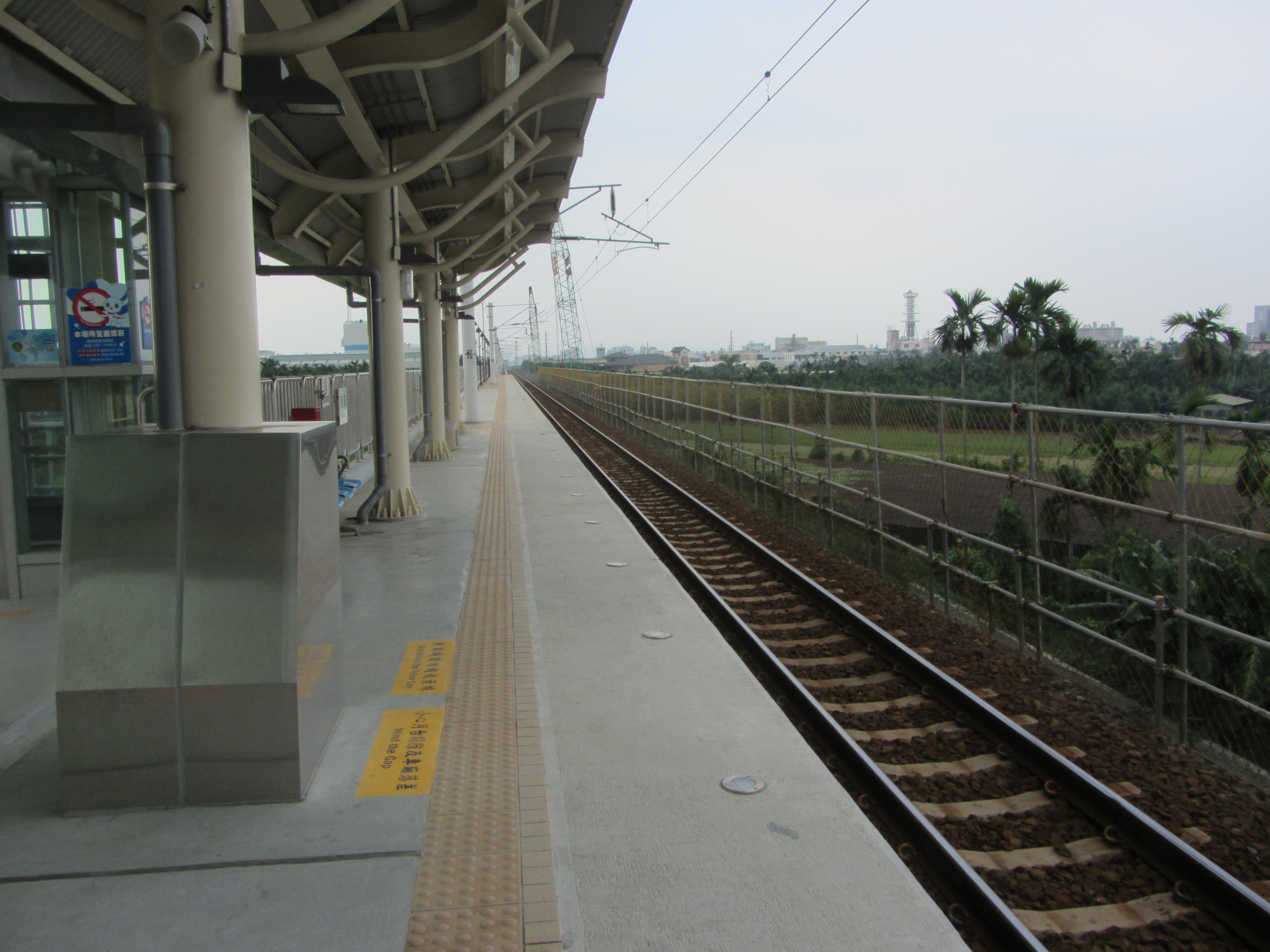 2013年6月25日的高架歸來車站月台